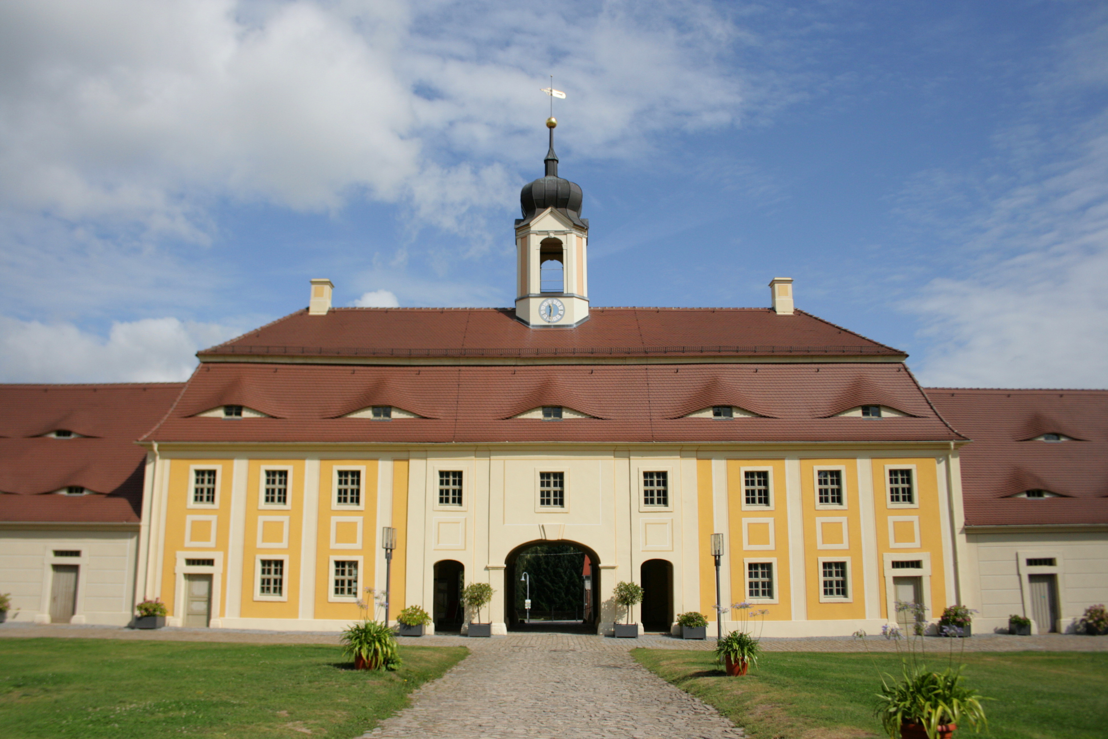 Barockschloss Rammenau in Rammenau